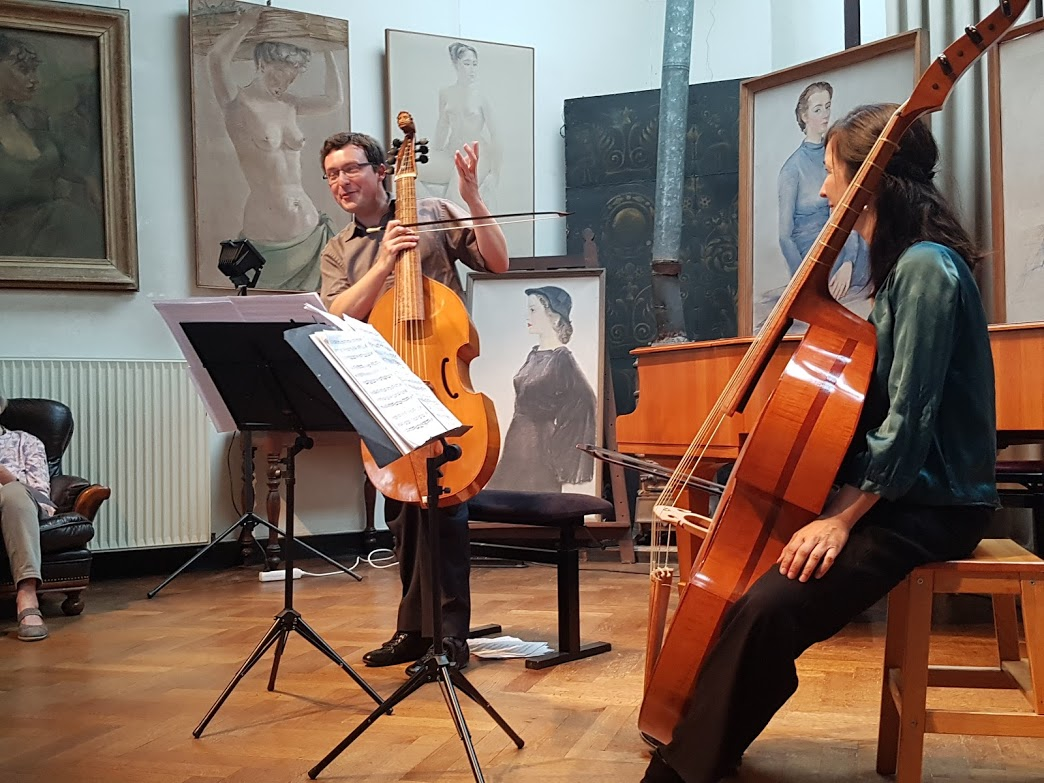 Concert pour violes de gambe, dans l'atelier Marcel Hastir, Bruxelles